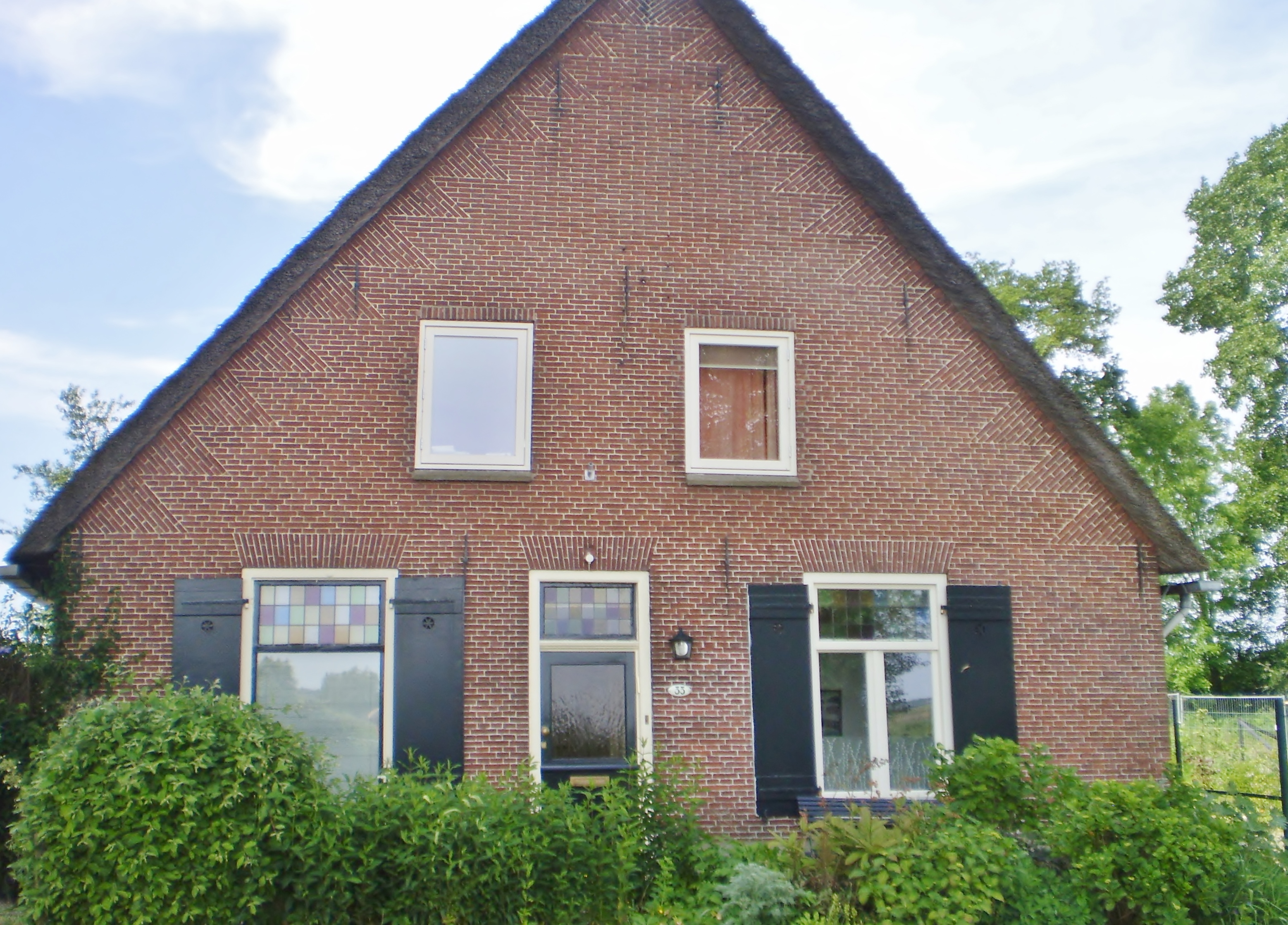 Oude Melm 33 gericht op de Eem